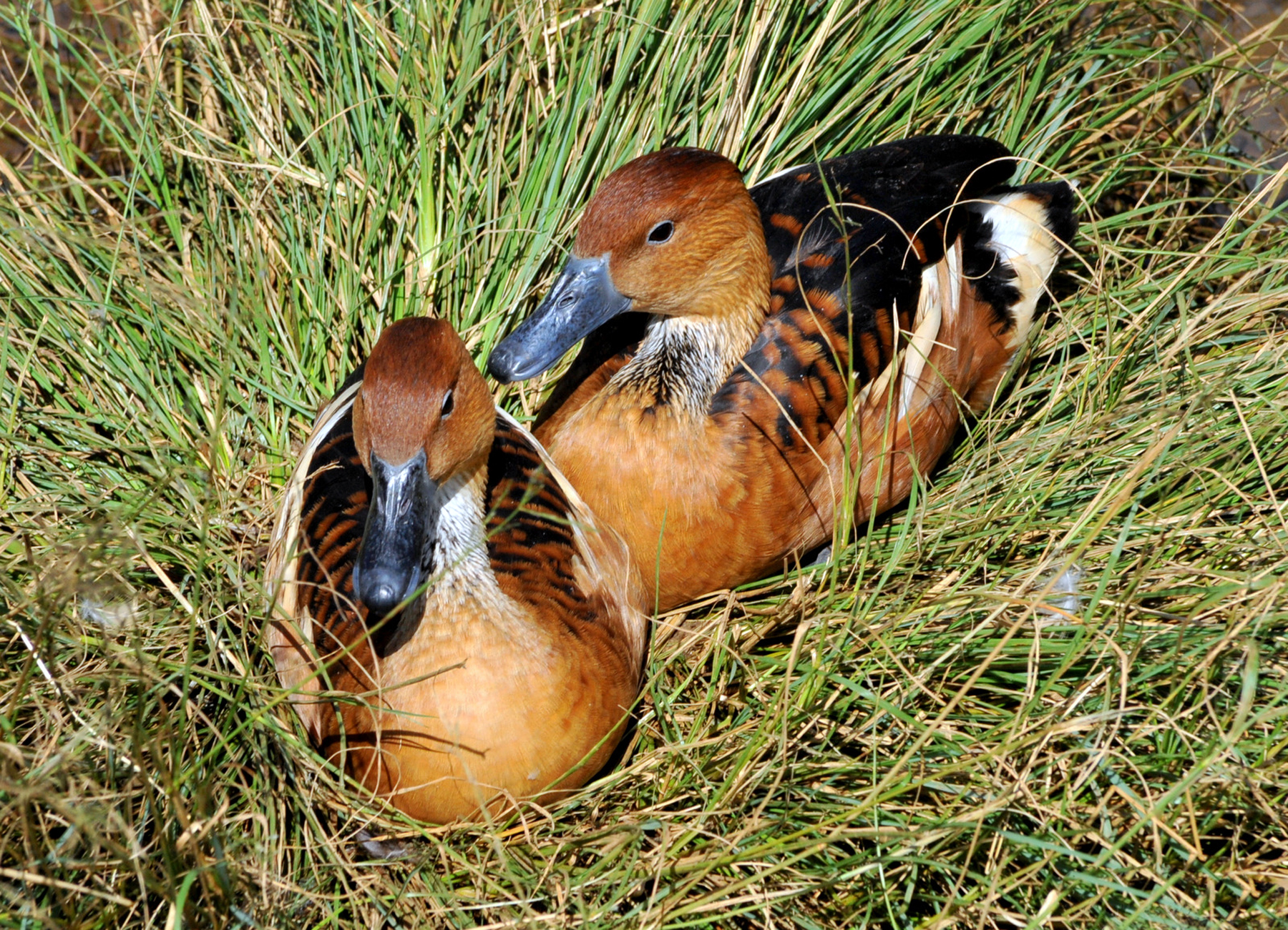 A marreca-caneleira é uma ave anseriforme da família Anatidae. Também conhecida como marreca-peba e xenxém. Seu nome científico significa: do (grego) dendros = árvore; e cygna, cygnus = referente ao cisne; e do (latim) bi = dois; e color = cor; bicolor= de duas cores. ⇒ Cisne de duas cores que pousa em árvores. WikiAves